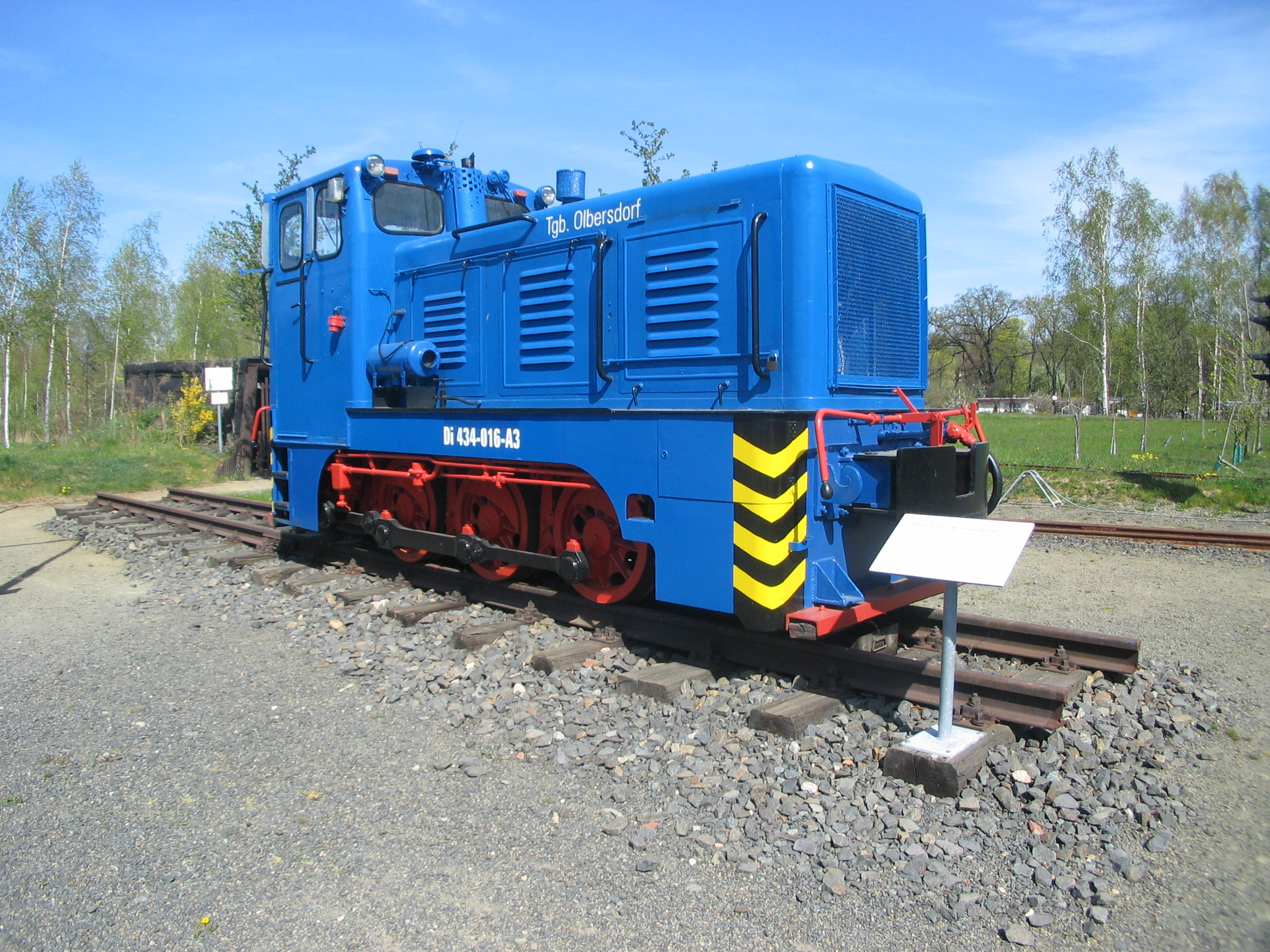 LKM V 10 C 250551 als Denkmallok am Olbersdorfer See